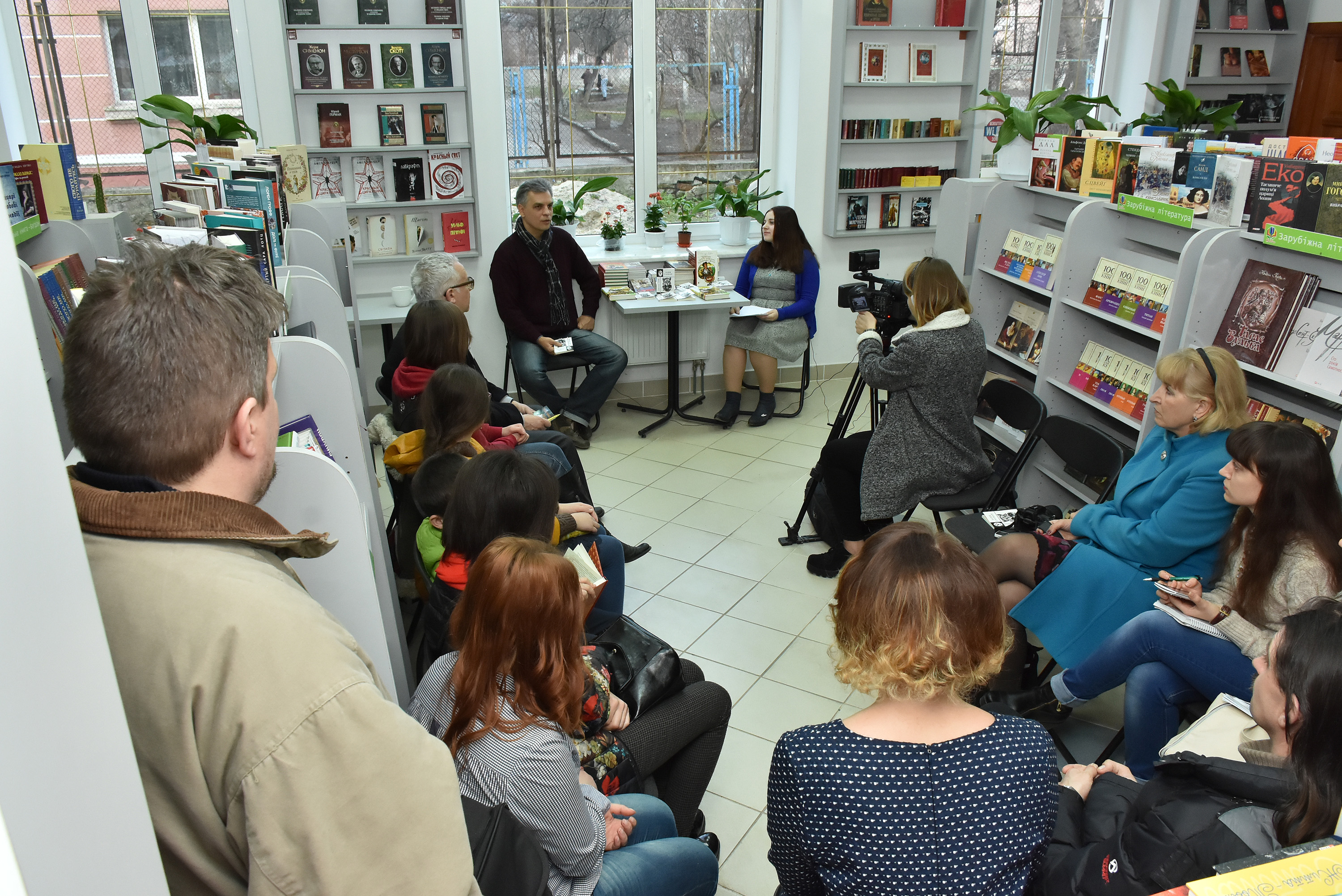 Презентація книжки «Казки і казкарі» Олександра Гавроша в «Домі книги», Тернопіль.